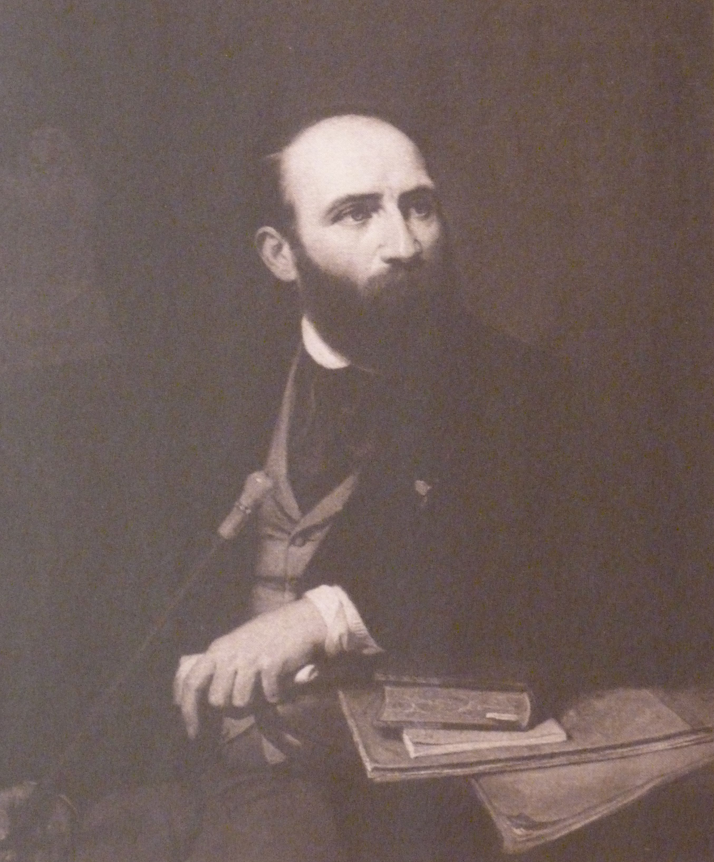 Émile Prisse d'Avesnes (1807-1879) - agrandissement exposé au Louvre d'une photo ancienne.